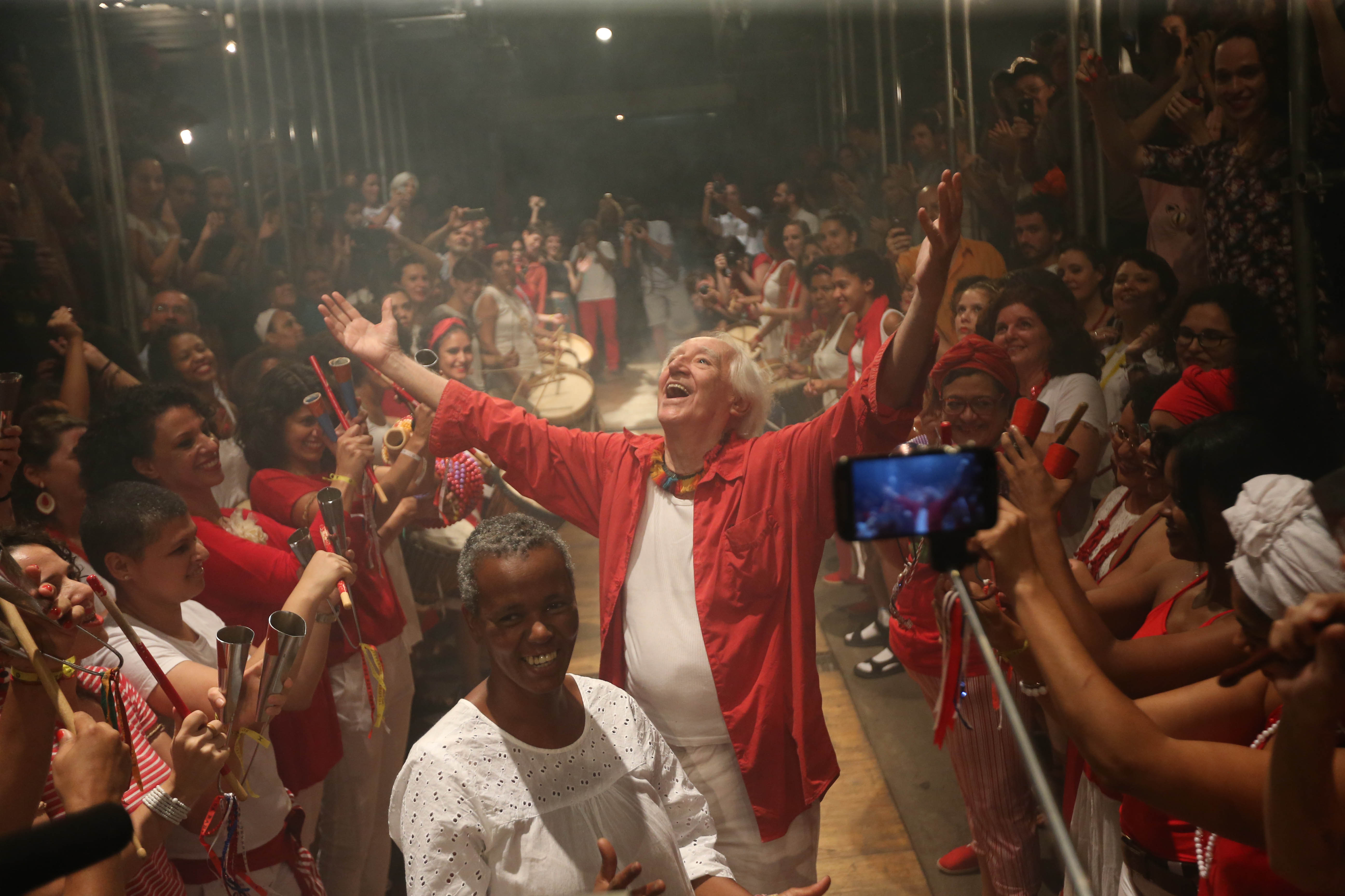 São Paulo 04/03/2016 - Ato da Cultura pela democracia no Teatro Oficina. Foto: Paulo Pinto/Agência PT